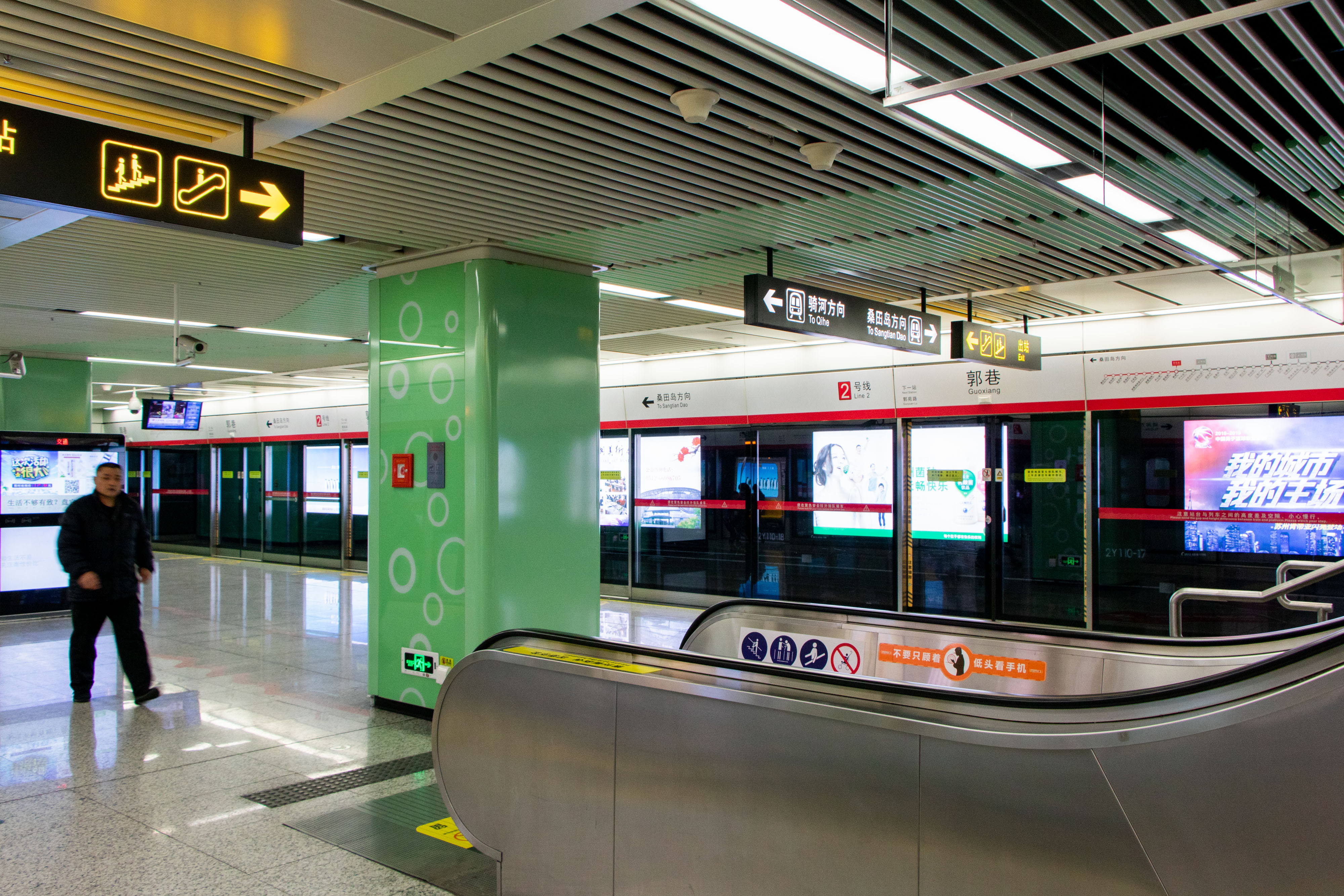 中文（中国大陆）: 郭巷站站台